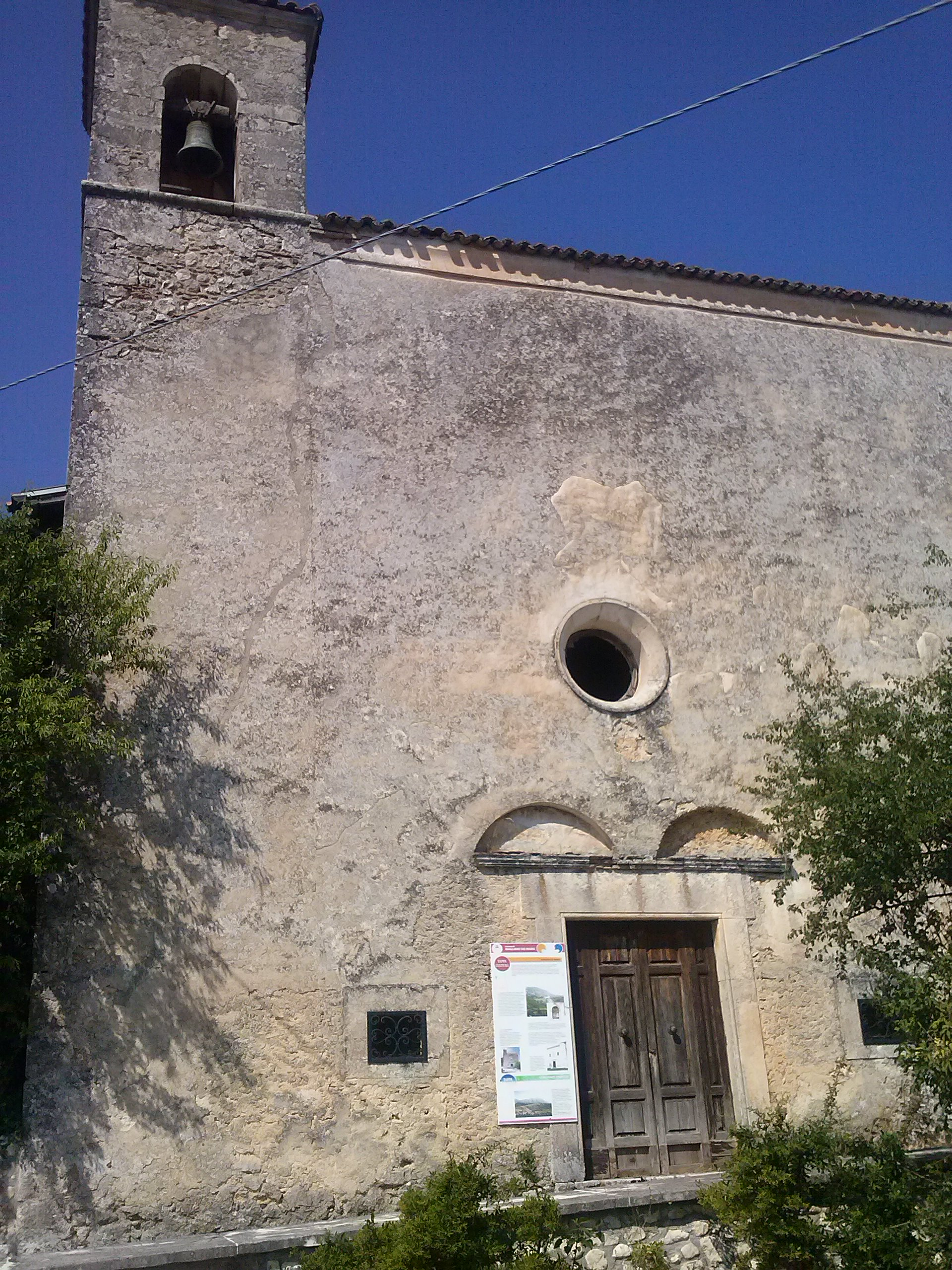 Facciata dell'antica chiesa dei Ss. Giovanni e Paolo